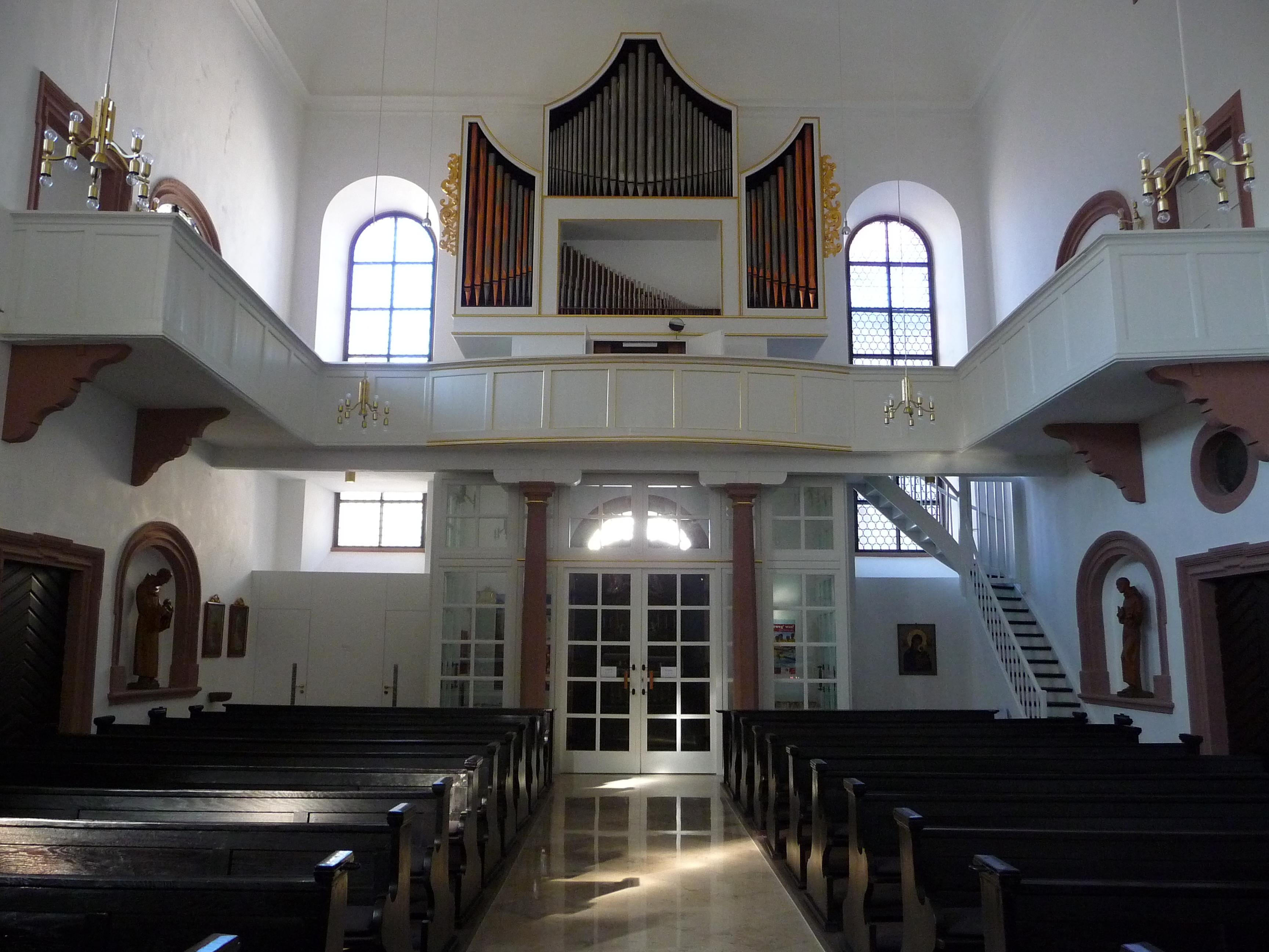 Orgel in der katholischen Kirche St. Anna in der Heidelberger Altstadt (Baden-Württemberg, Deutschland)